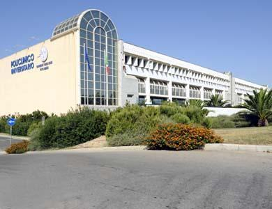 Policlinco Monserrato, Cagliari